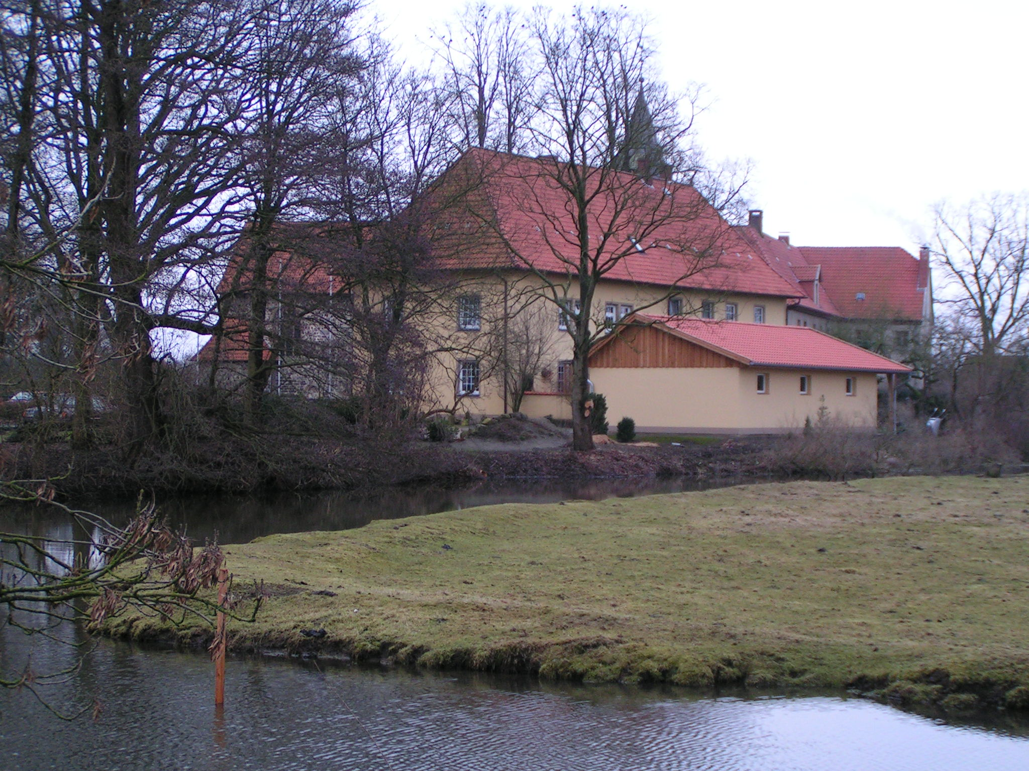 Ehemaliges Kloster Malgarten (Stadt Bramsche), von der Hase aus betrachtet